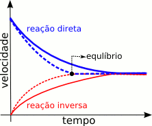 Gráfico da diferença entre um equilíbrio químico com e sem catalisador (desenhado por mim)